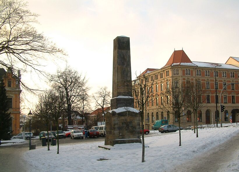 Konstitutionssäule Zittau, Saxony, Germany